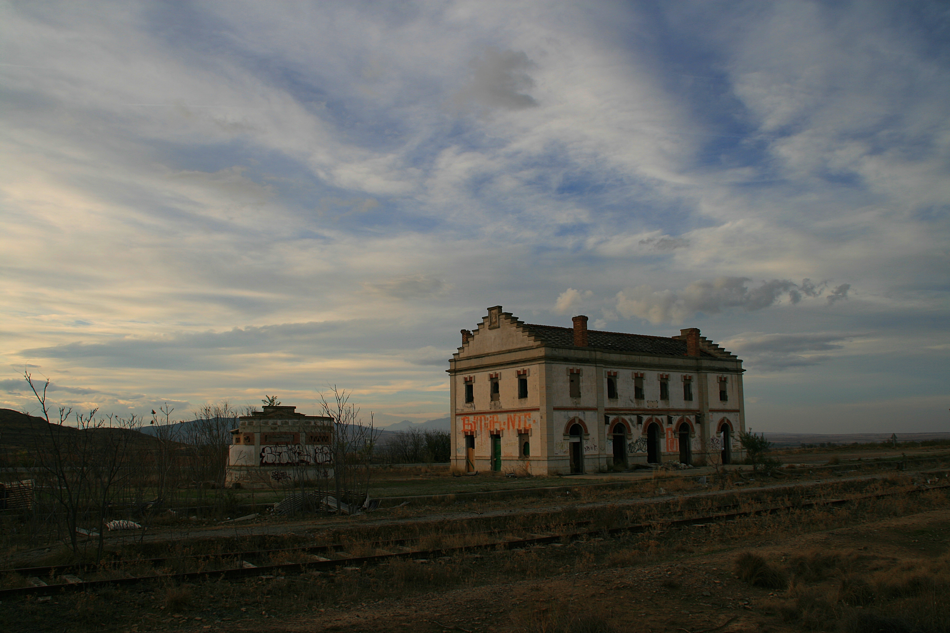 Línea del ferrocarril Soria-Castejón. Estacion de Cintruénigo, Navarra